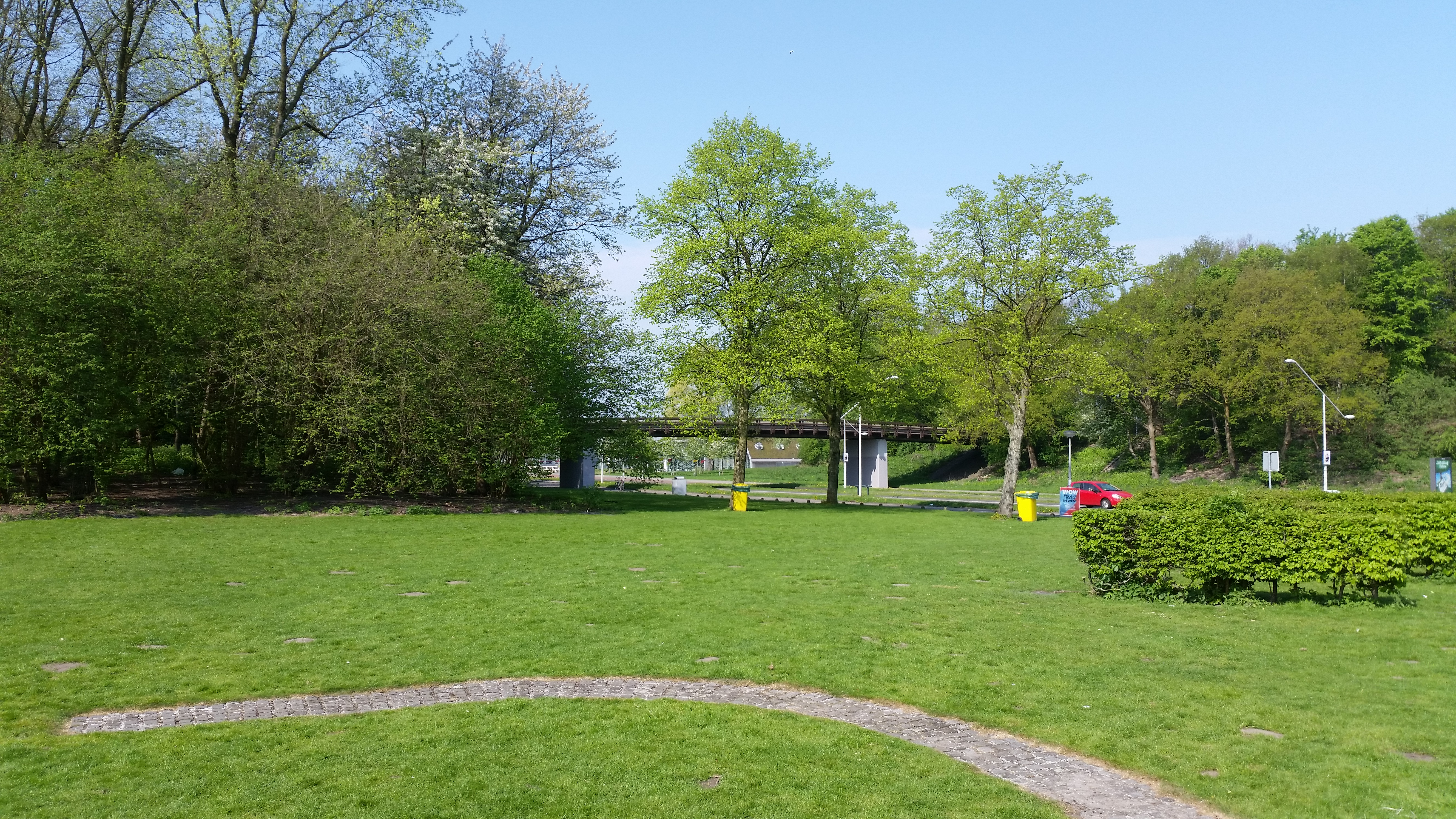 Brug 677 in Sloterpark over President Allendelaan